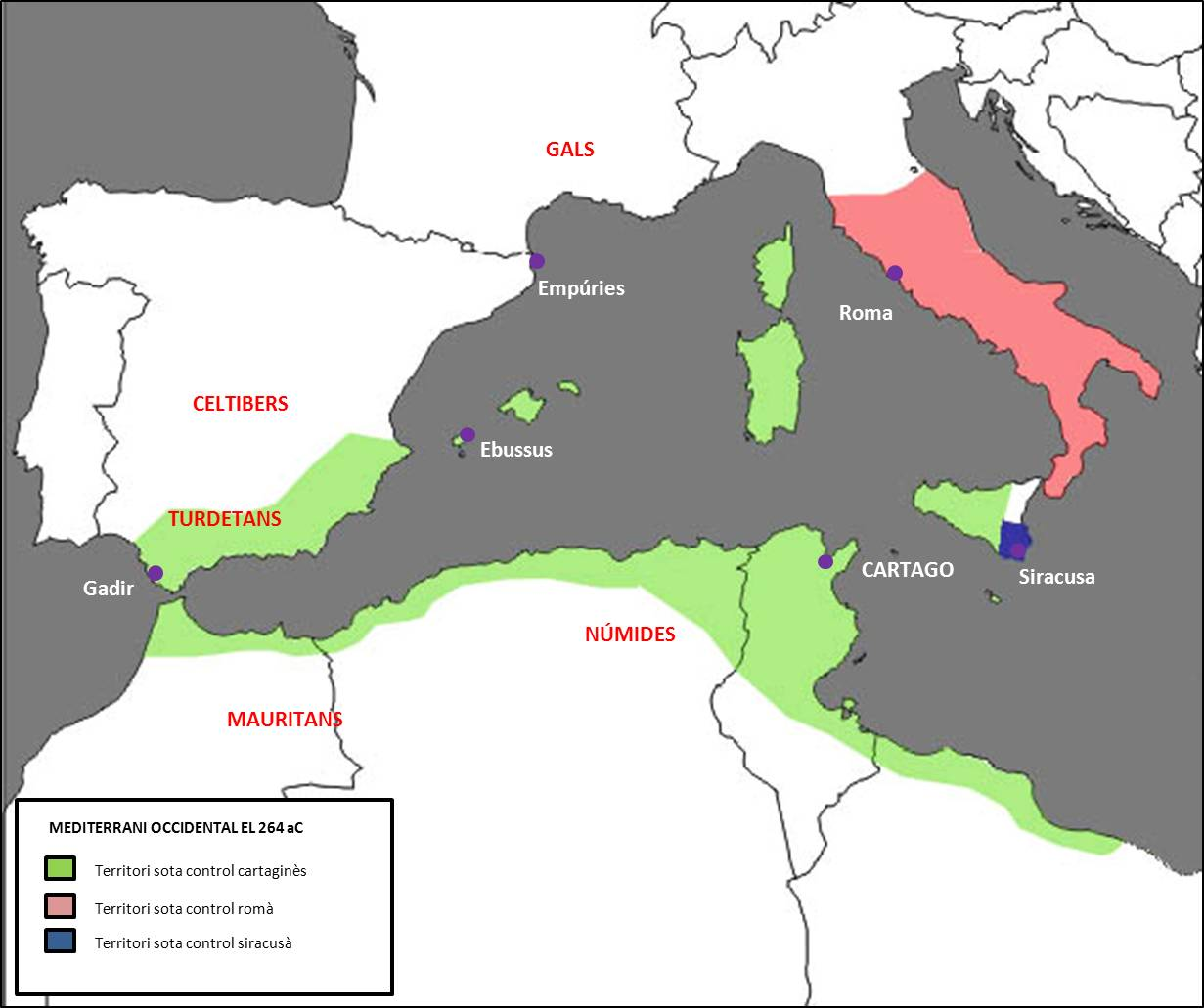 La situació política al Mediterrani occidental el 264 aC